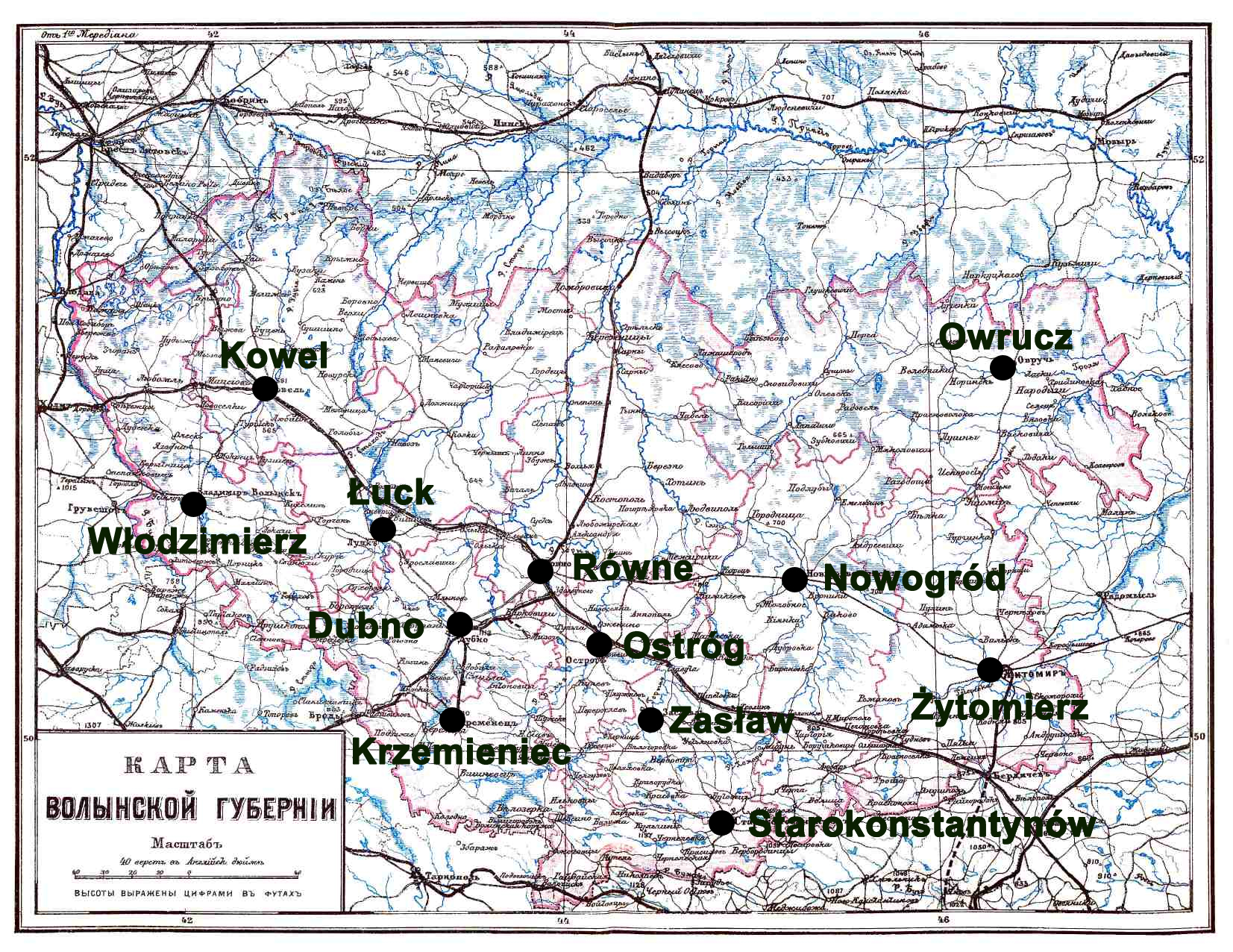 Mapa guberni wołyńskiej z polskimi nazwami miast